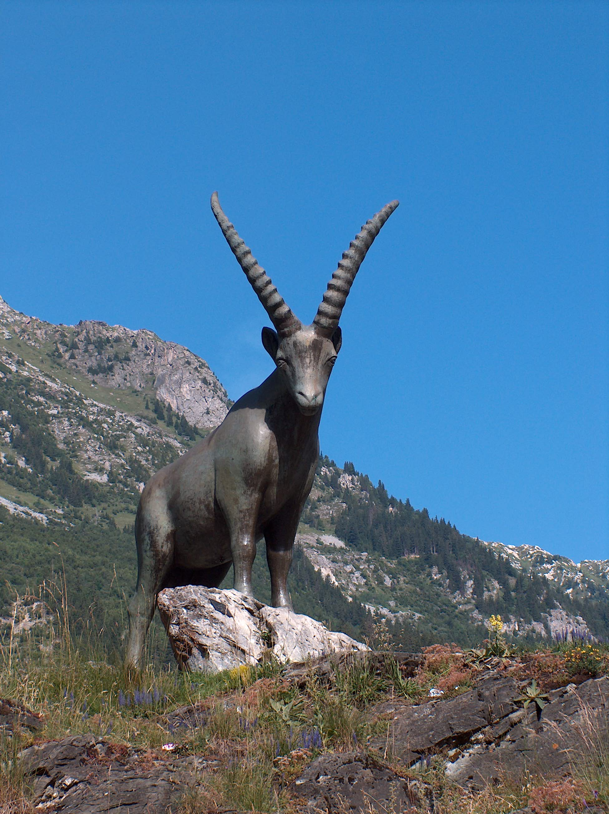 Bouquetin, emblème de Pralognan-la-Vanoise